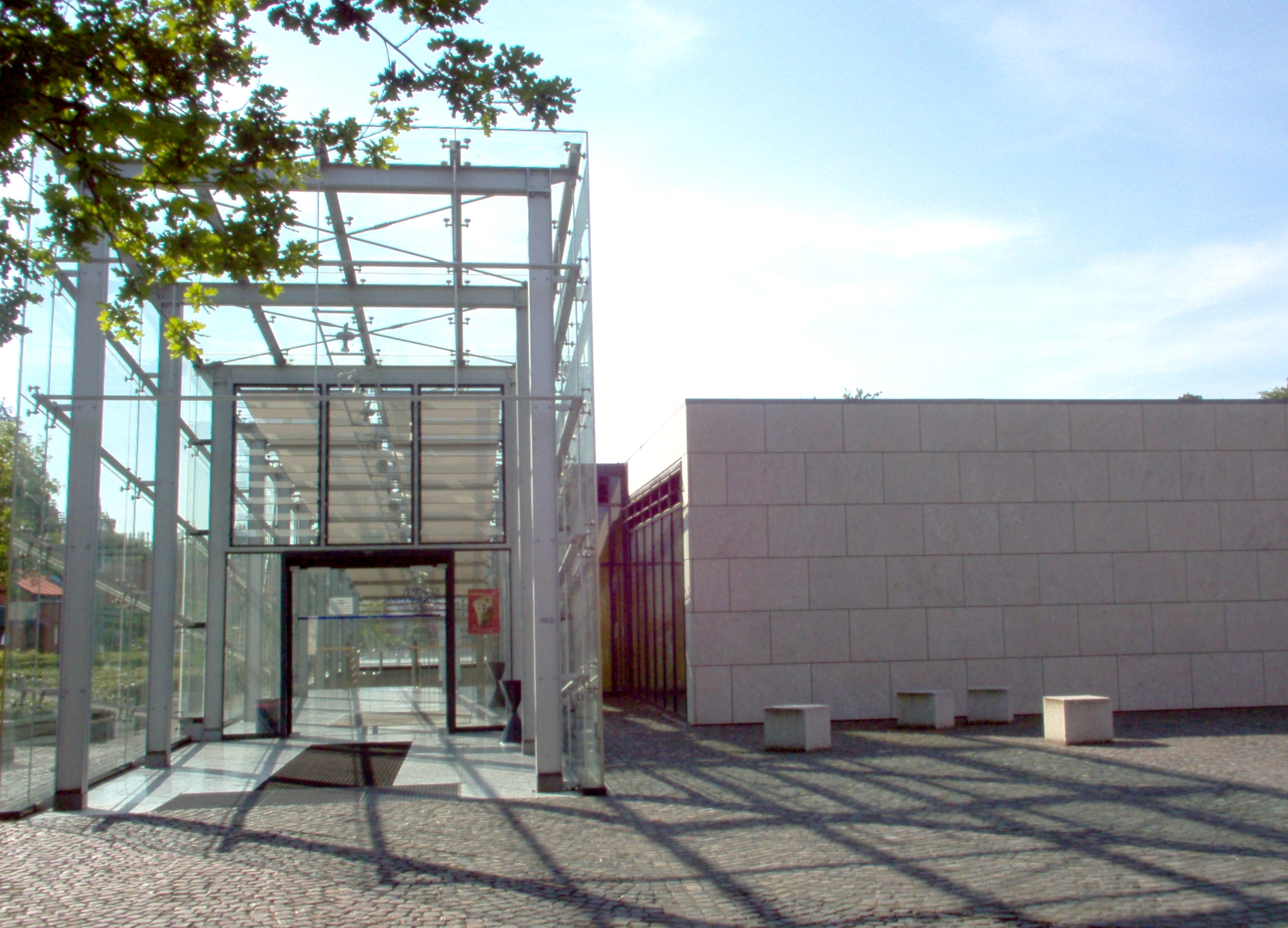 Zentrale medizinische Bibliothek der Philipps-Universität in Marburg